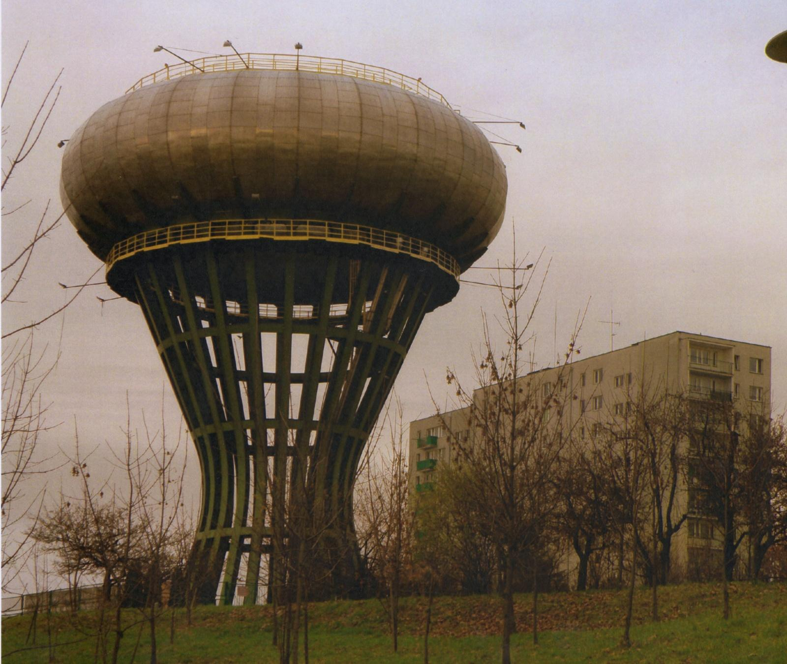 Tarnowski wodociąg. Toroidalny zbiornik wody położony w pobliżu osiedli mieszkaniowych.